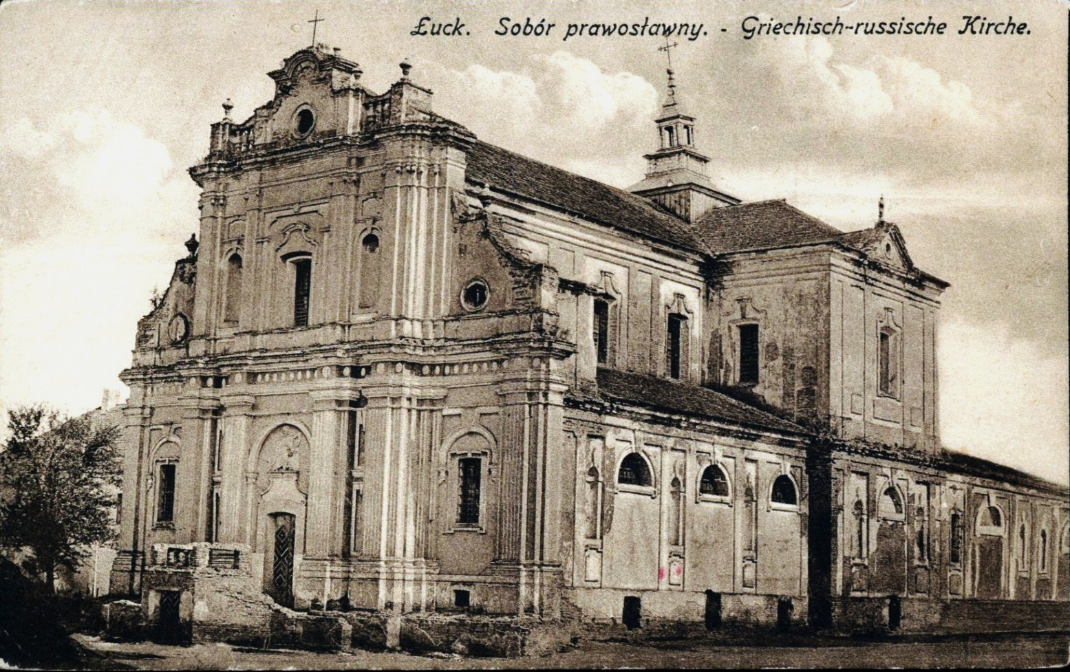 Костел бернардинів в Луцьку до перебудови